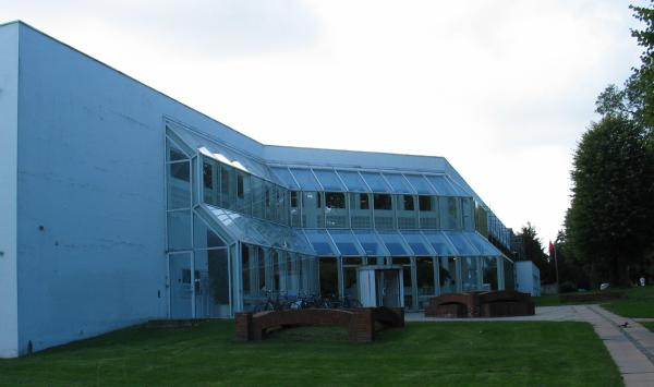 Gentofte Hovedbibliotek. Set fra øst.